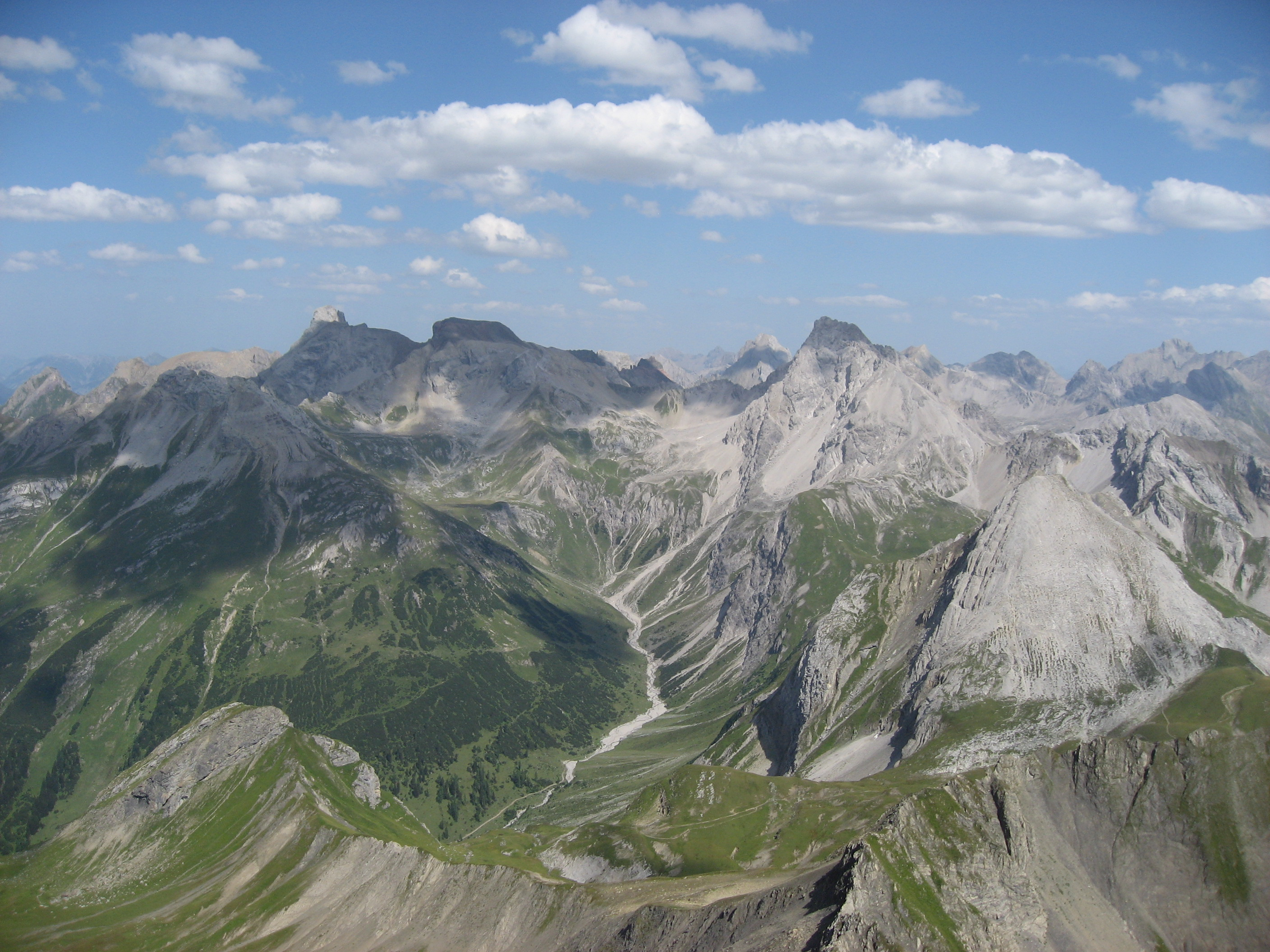 Blick vom Stanskogel auf das Kaisertal. Im Hintergrund die zentralen Lechtaler Alpen mit Holzgauer Wetterspitze, Feuerspitze, Freispitze, Vorderseespitze und Parseierspitze